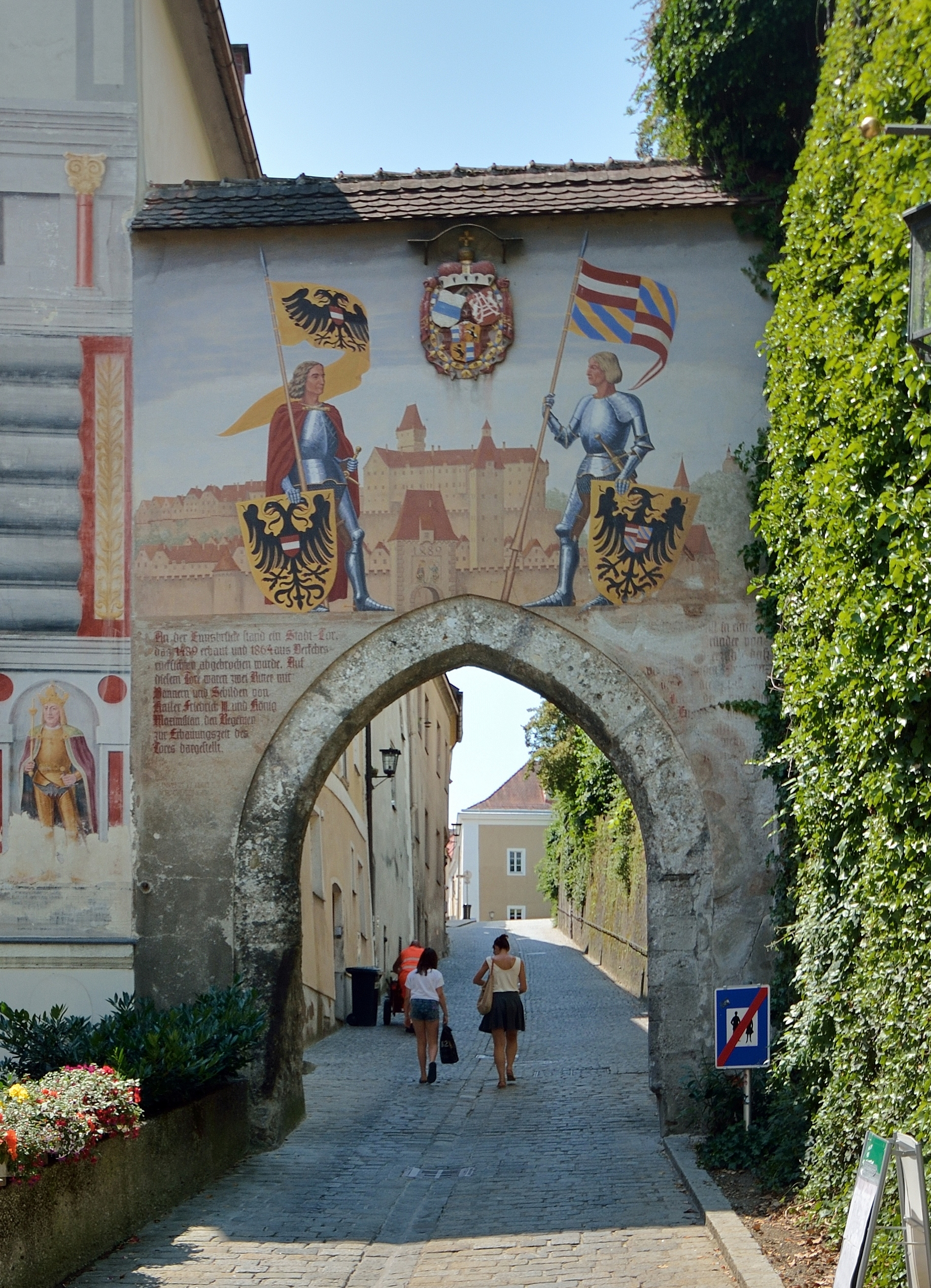 Das untere gotische Burgtor von Schloss Lamberg mit dem Ritterfresko von Otto Götzinger (1949) in der Steyrer Berggasse. Ansicht von Zwischenbrücken